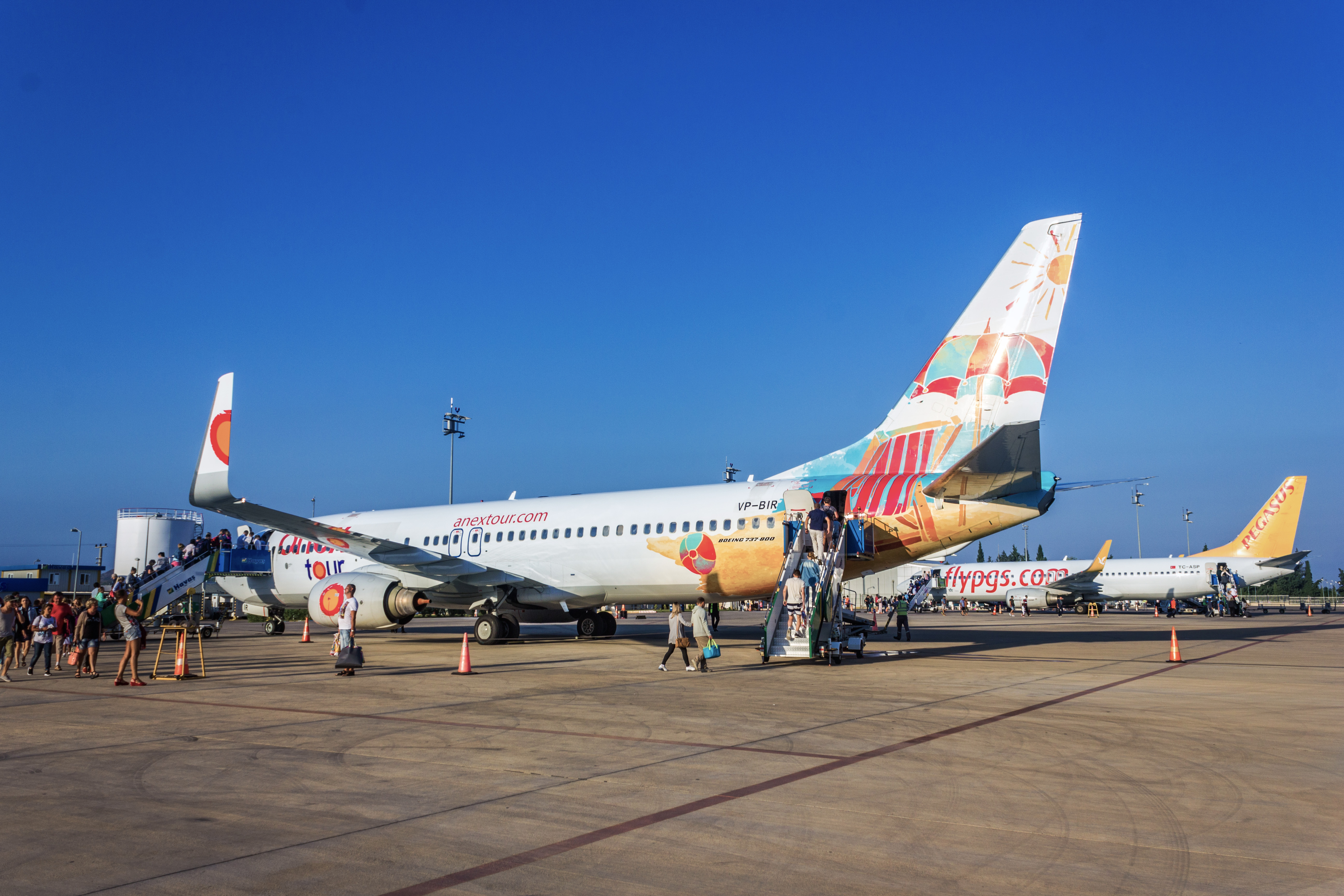 Самолёт Boeing 737-800 в аэропорту Газипаша-Аланья